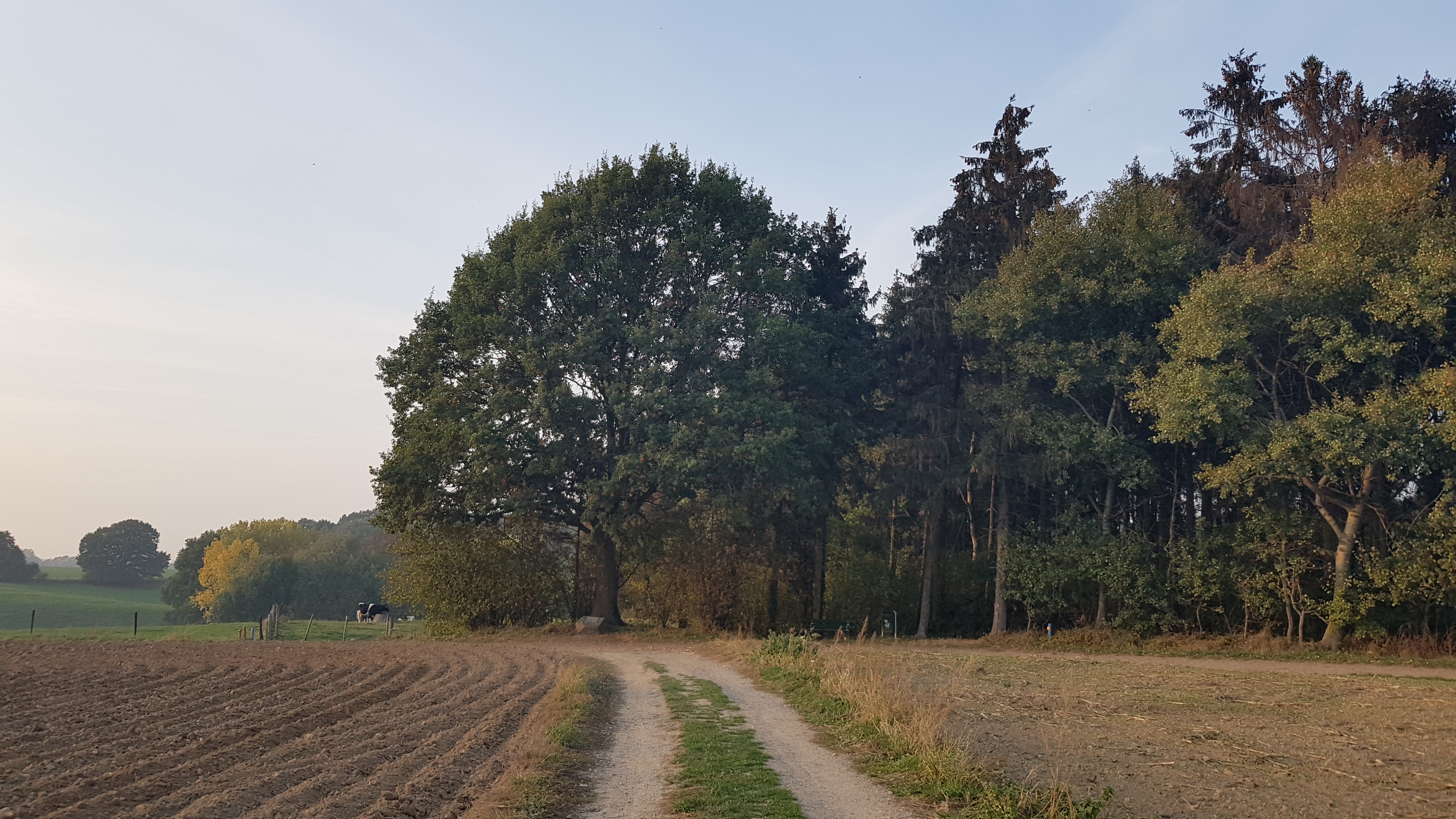 Het Gericht aan de Wijlre Gerichtweg, Beertsenhoven, Wijlre, Gulpen-Wittem, Nederland